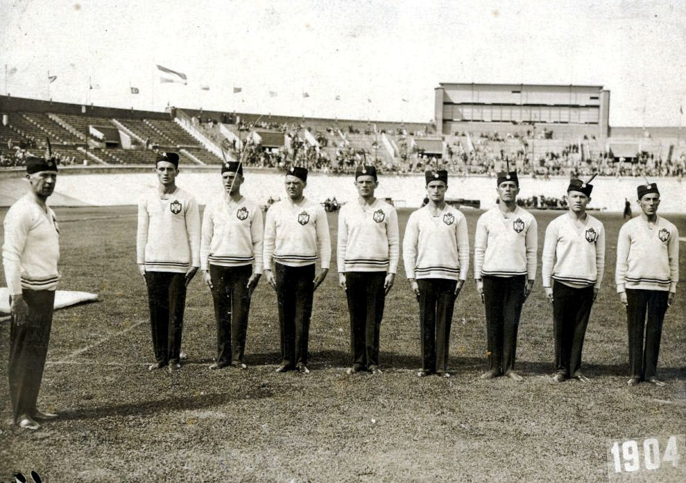 Skupinska fotografija, posneta na olimpijskem stadionu v Amsterdamu. Od leve proti desni stojijo: Viktor Murnik (vodnik vrste), Boris Gregorka, Dragutin Ciotti, Stane Derganc, Josip Primožič, Anton Malej, Janez Porenta, Edvard Antosiewicz in Leon Štukelj